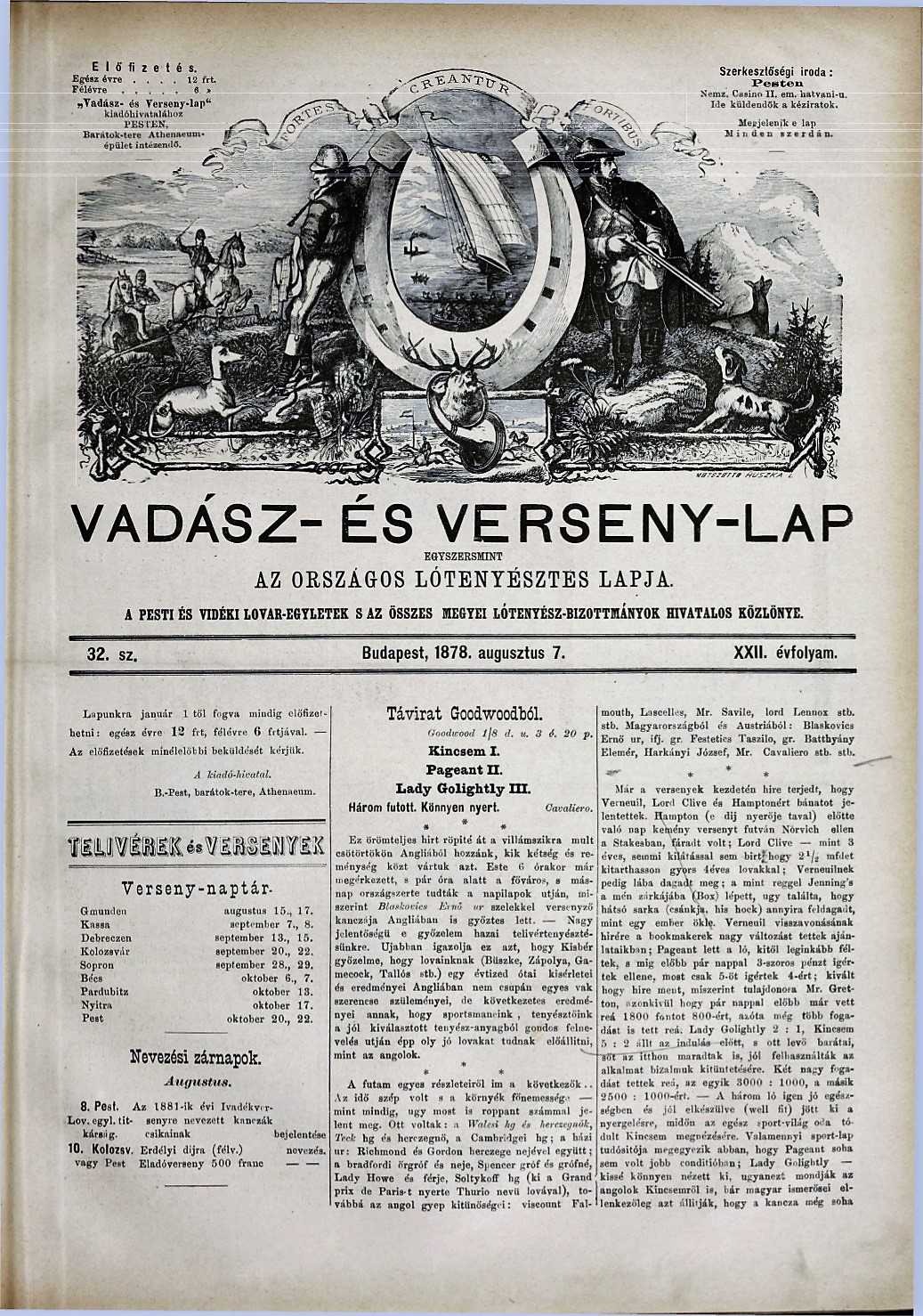 A Vadász és Versenylap 1878. augusztus 7-én megjelent címlapja, amelyen Kincsem nagy győzelméről szóló tudósítás van az 1878. augusztus 1-én futott goodwoodi versenyről